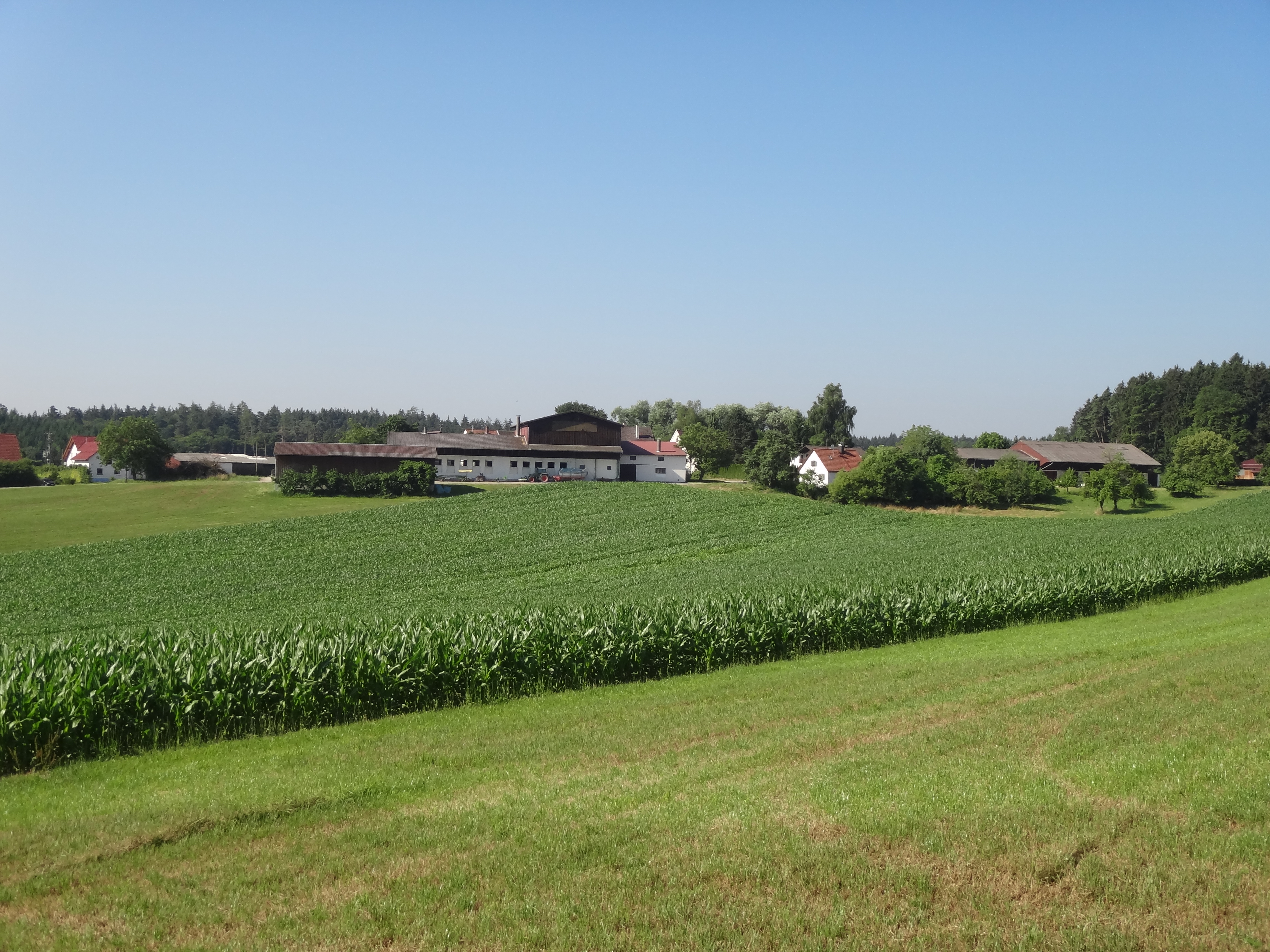 Kreuthöfe 21.07.2013